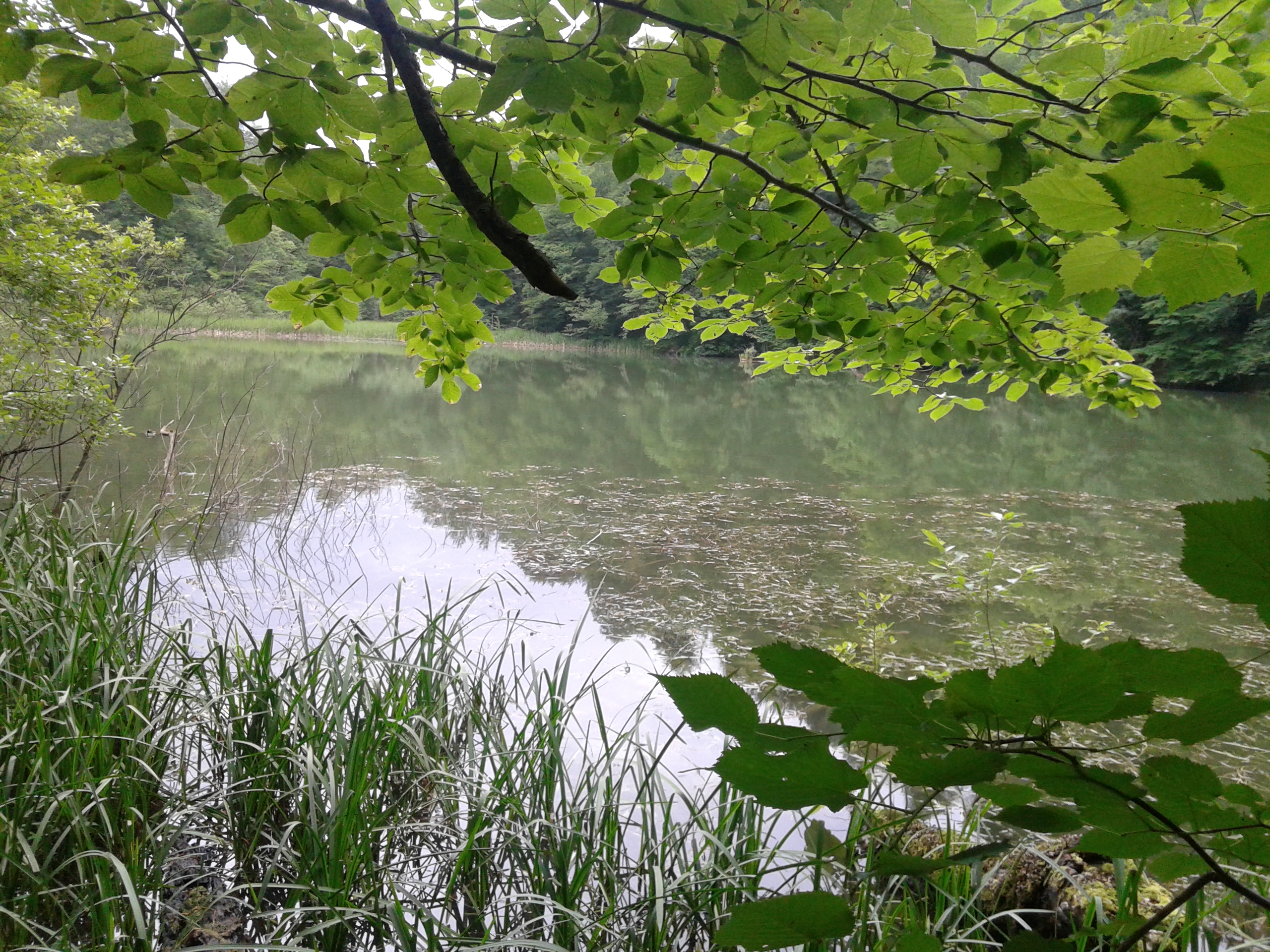 Əmbil gölü 1